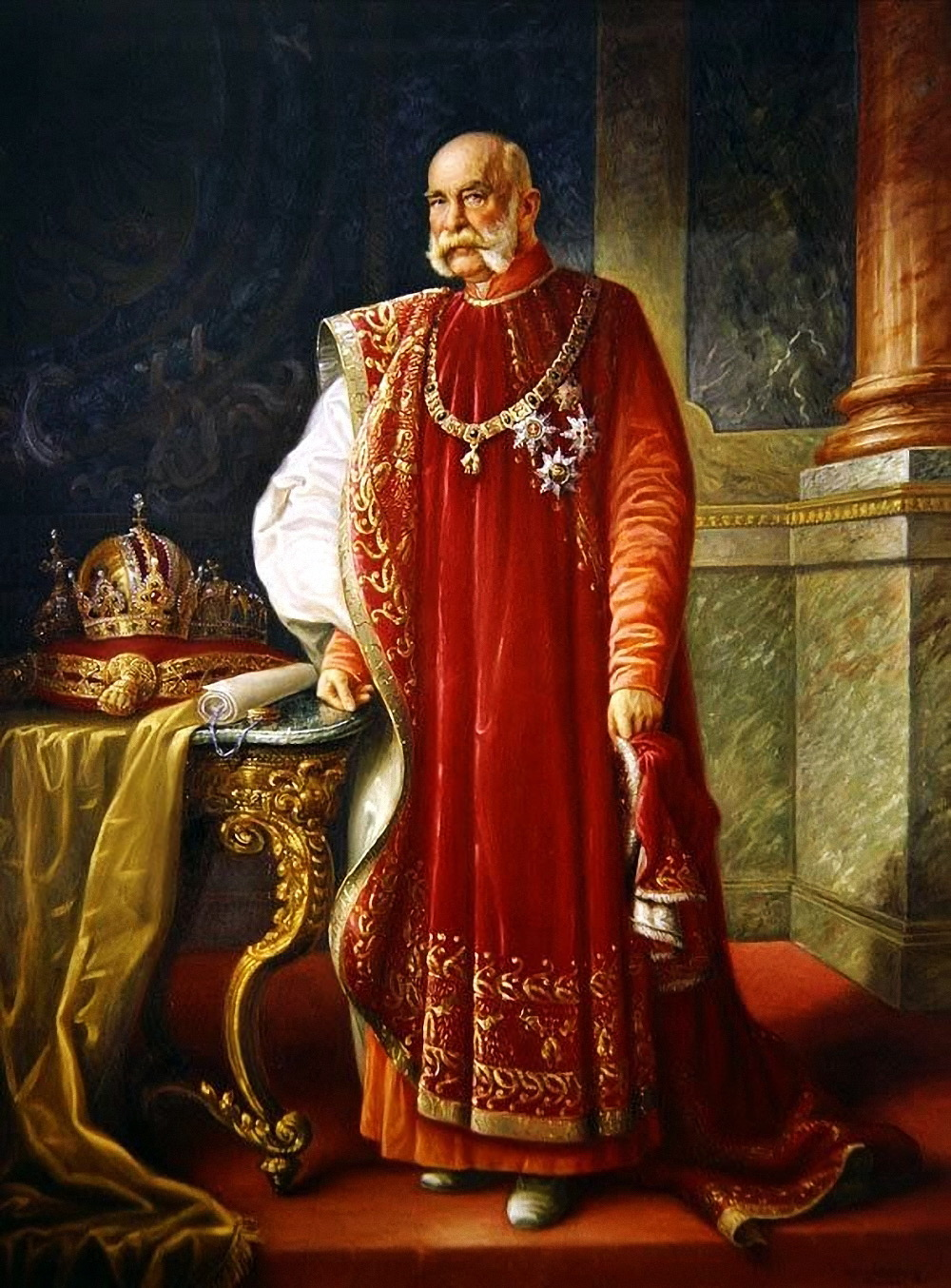 Kaiser Franz Joseph I in Herold des Ordens vom Goldenen Vlies